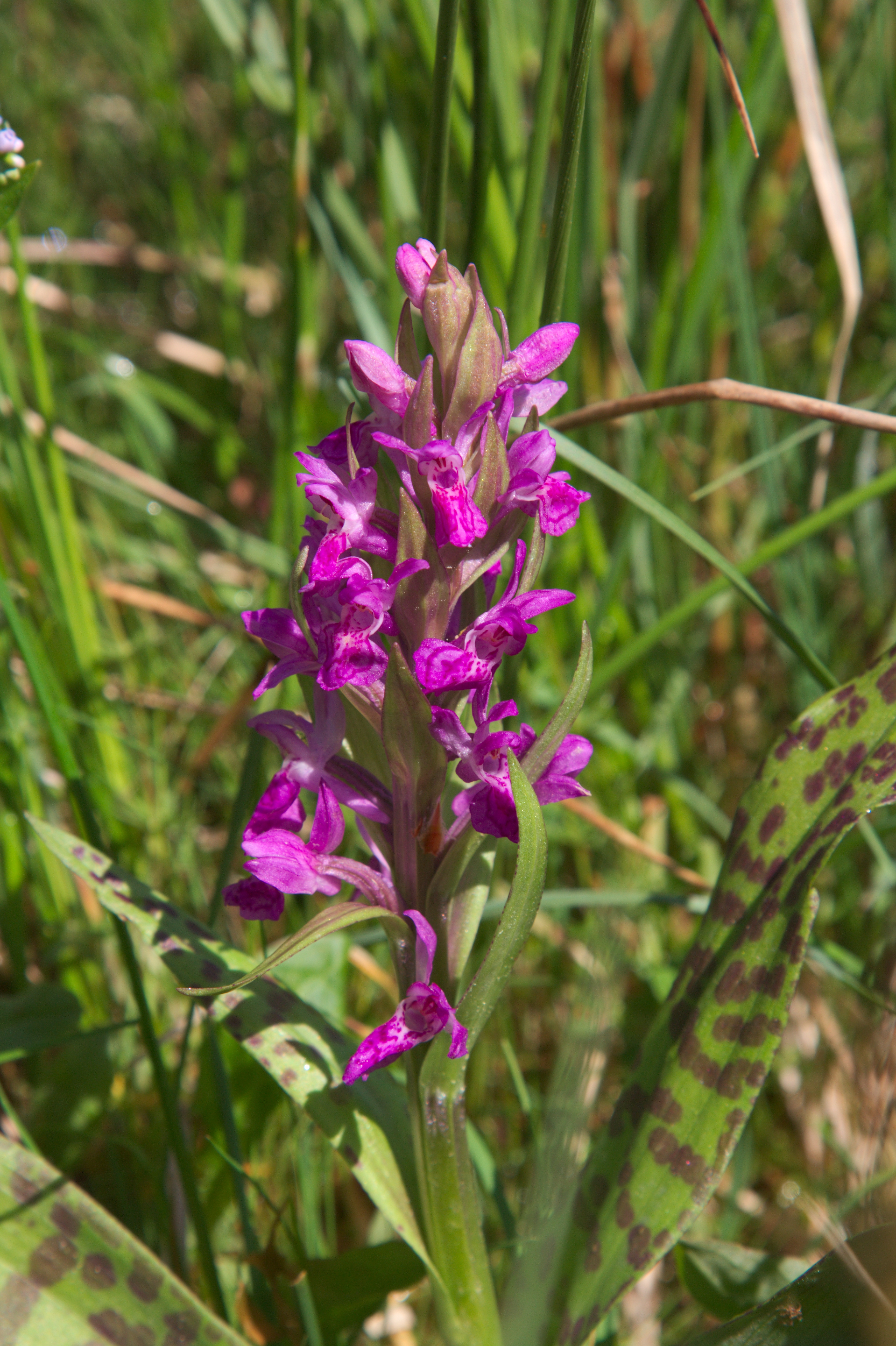 Skalák u Senotína (přírodní rezervace) - Dactylorhiza majalis (Rchb.) P. F. Hunt et Summerh., prstnatec májový - status ohrožení v ČR: C3 (ohrožený)